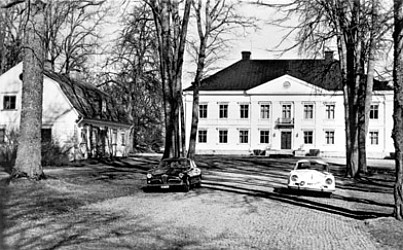 Hedensö herrgård på 1950-talet